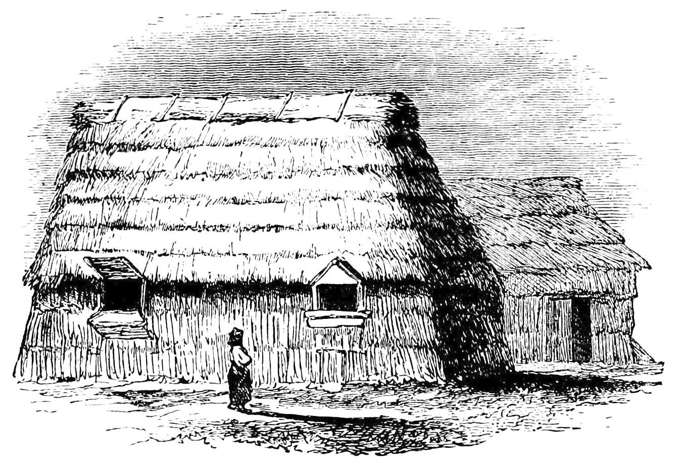 Ainu houses